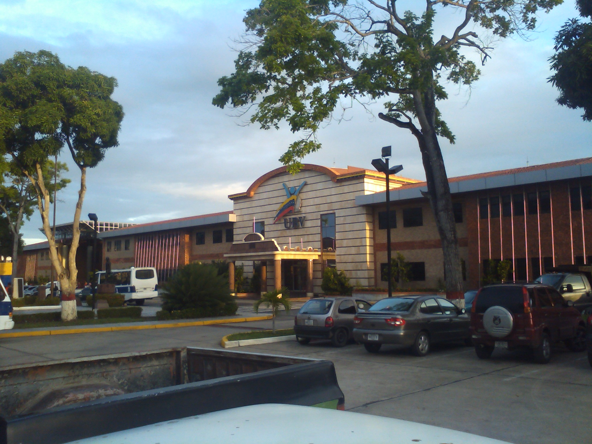 FACHADA DE LA SEDE PRINCIPAL DE LA UNIVERSIDAD BOLIVARIANA DE VENEZUELA EN MATURIN